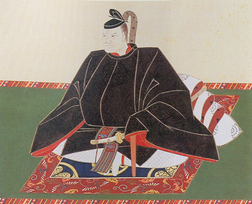 徳川義直 Tokugawa Yoshinao